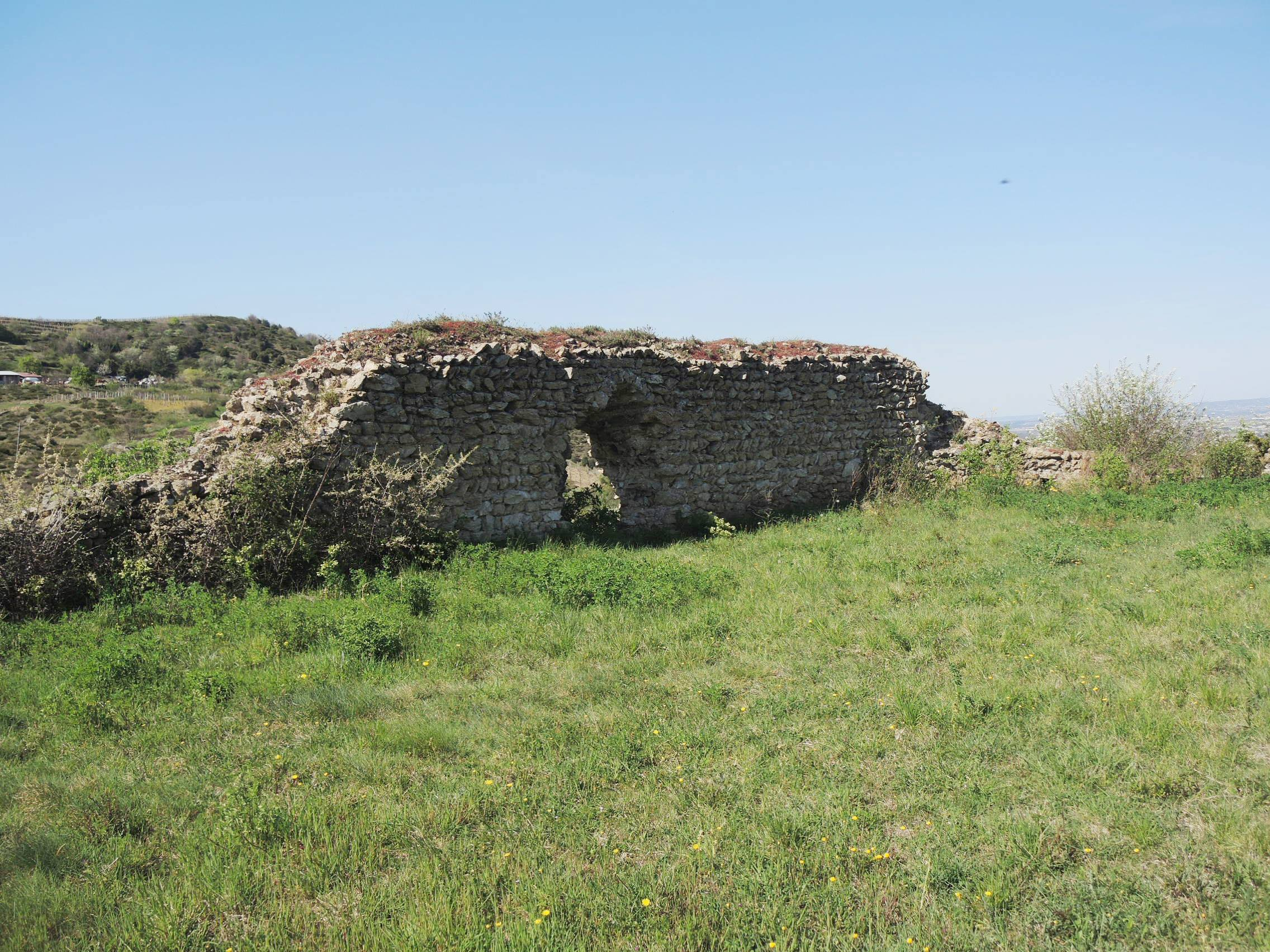 Sarras détail